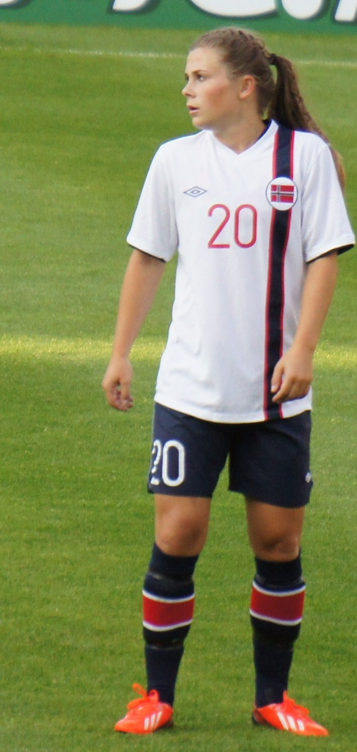 Emilie Bosshard Haavi En équipe de Norvège.